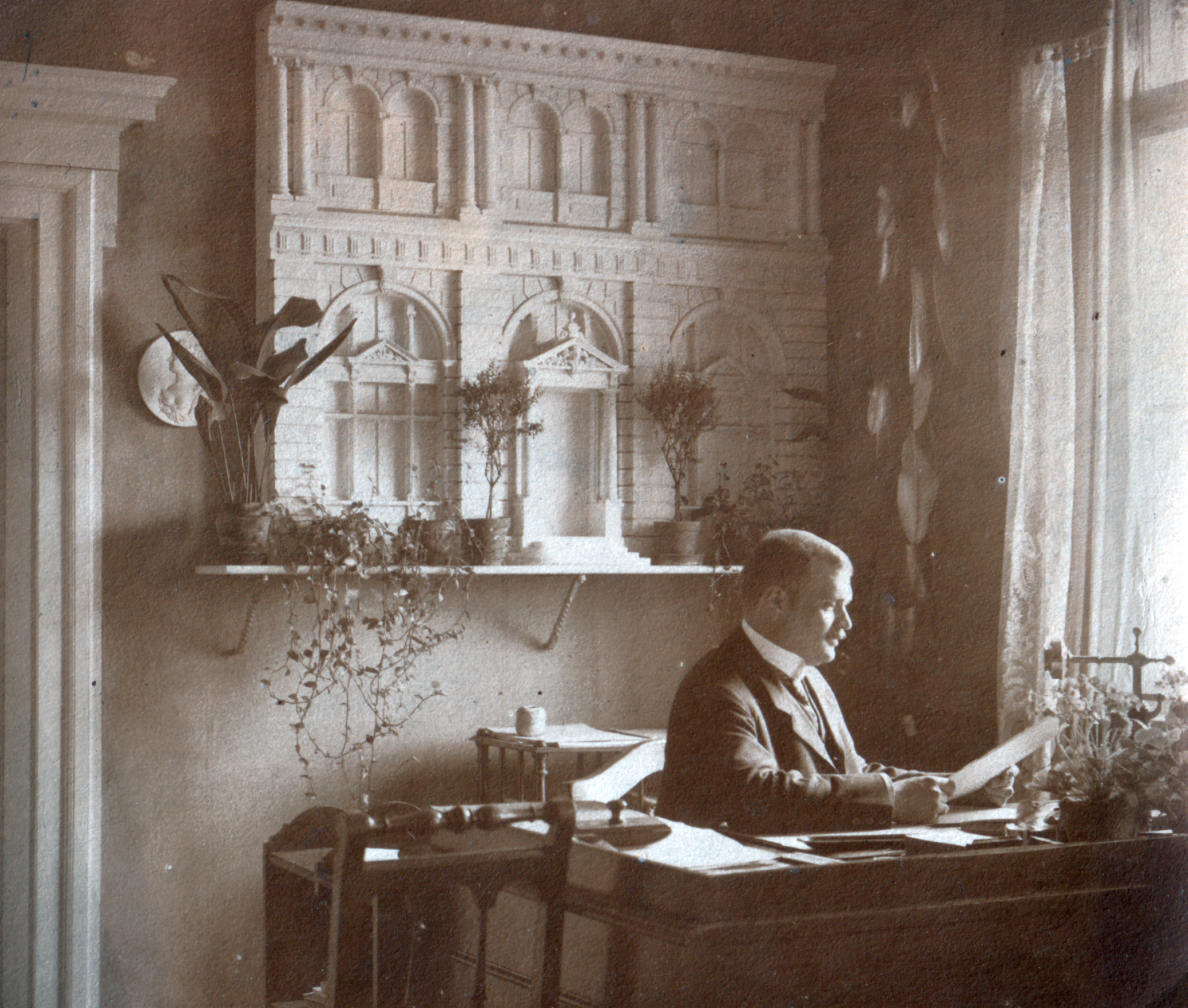 Albert Lehr (* 20. Mai 1874 in Karlsruhe; † 1931 in Nürnberg) war Architekt und als Oberregierungsbaurat und Oberpostbaurat in Nürnberg tätig. Seine herausragende berufliche Arbeit war der Bau der Nürnberger Kirche St. Paul in der Rangierbahnhof-Siedlung.